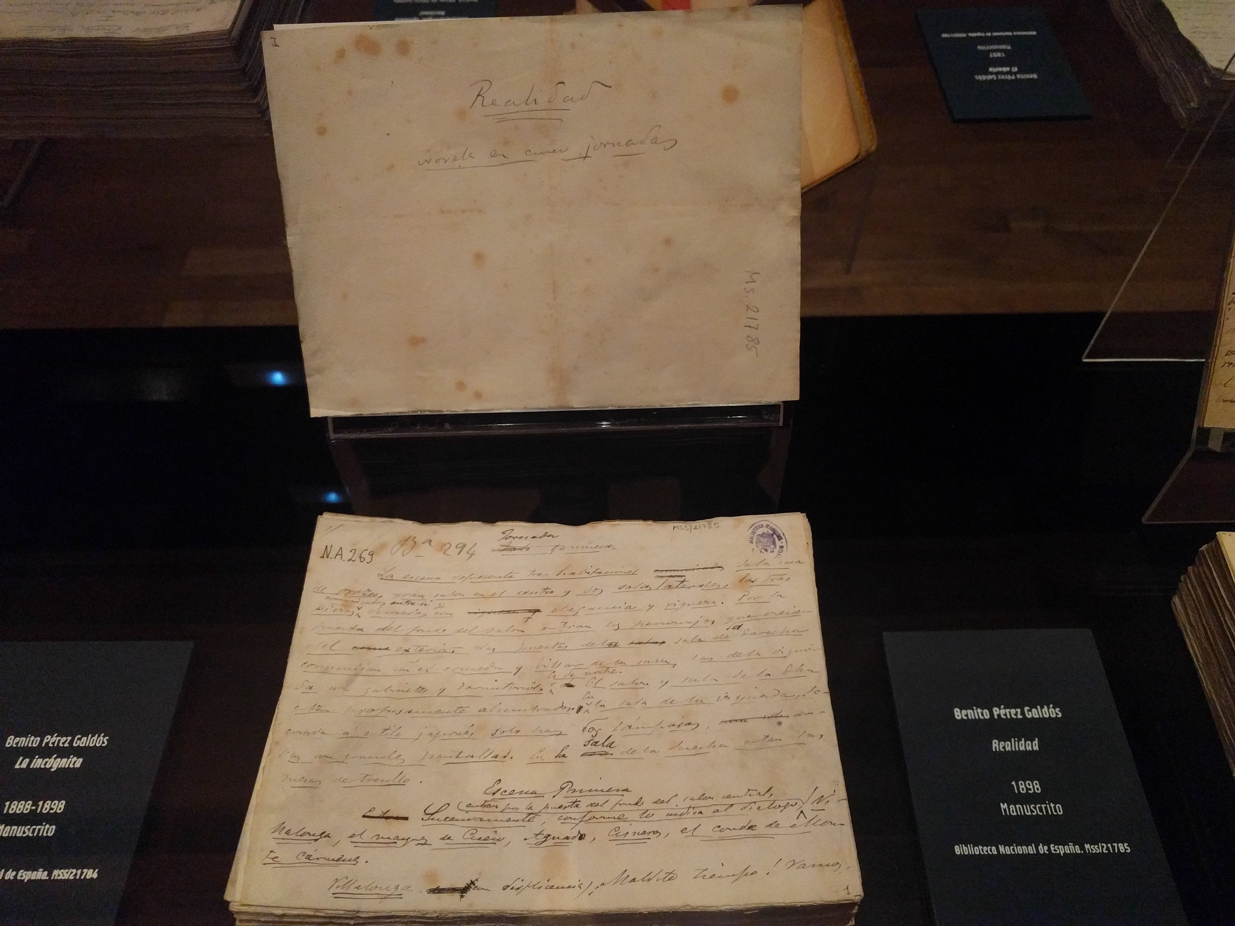 Manuscrito de Realidad (novela) de Benito Pérez Galdós, 1898. Biblioteca Nacional de España.